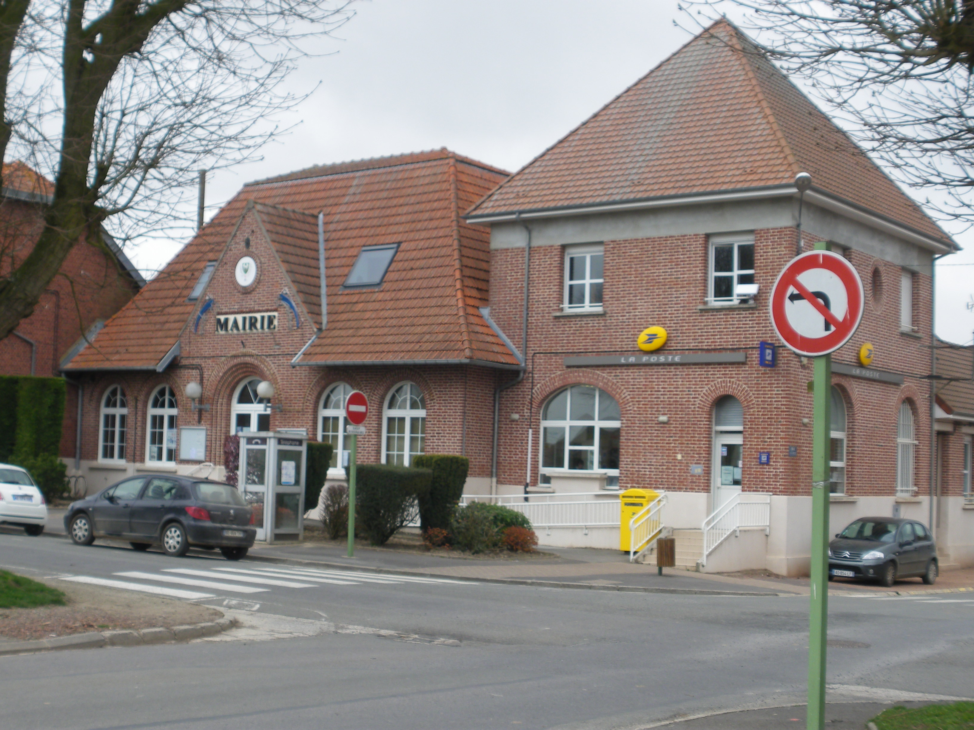 Vue de la mairie d'Hermies.